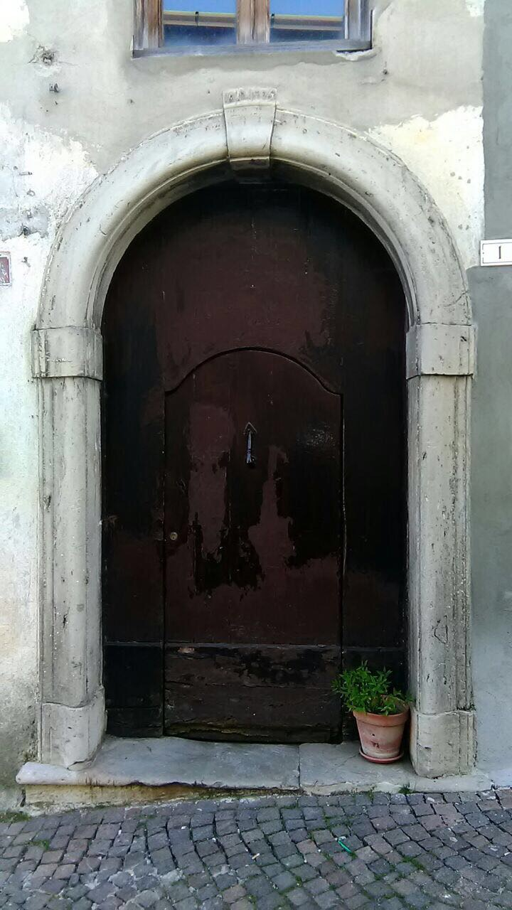 Portale Colucci, Pignola